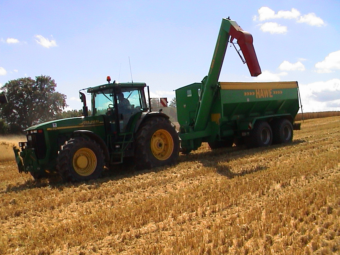 Traktor John Deere 8310 vor HAWE-Überladewagen mit Tandemfahrwerk und Saatgutrutsche (Abtankrohr)